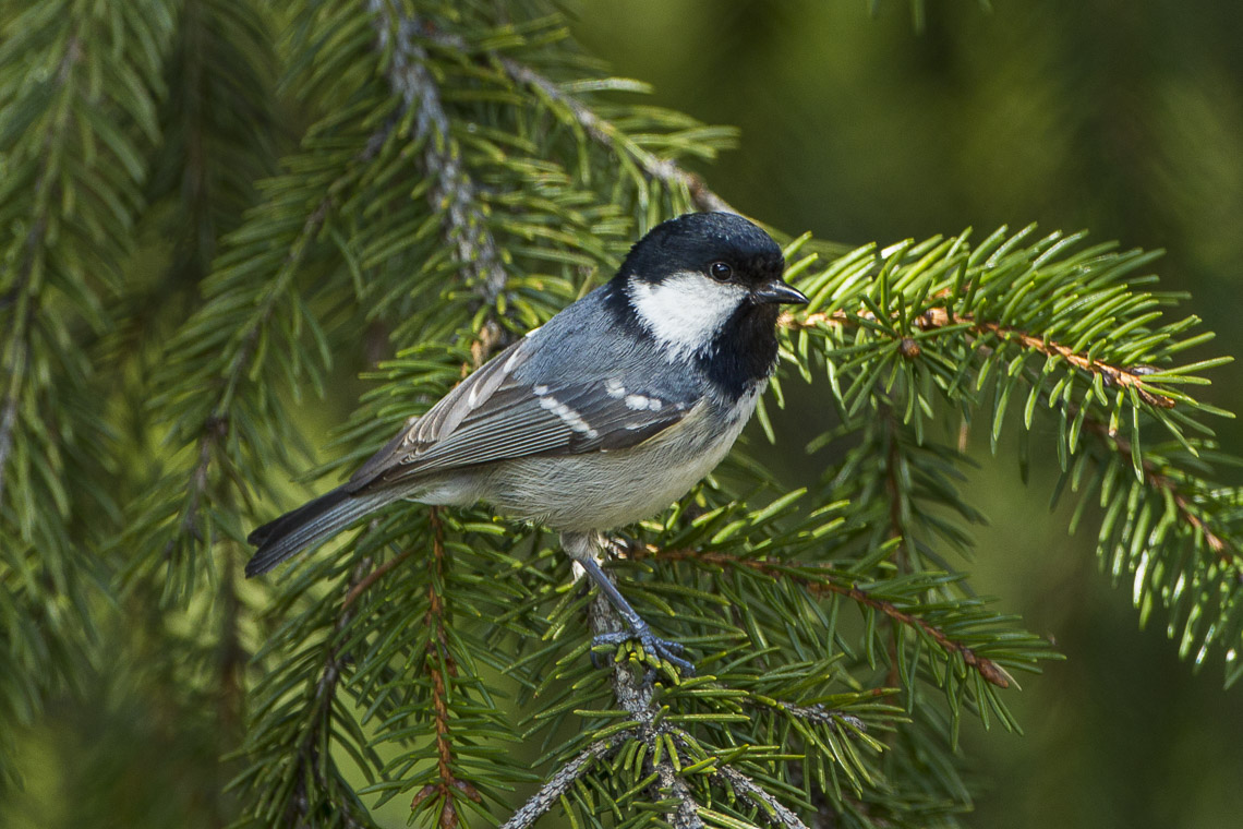 Coal Tit ( Cincia Mora ) - Val d'Aosta - Italy_S4E4594